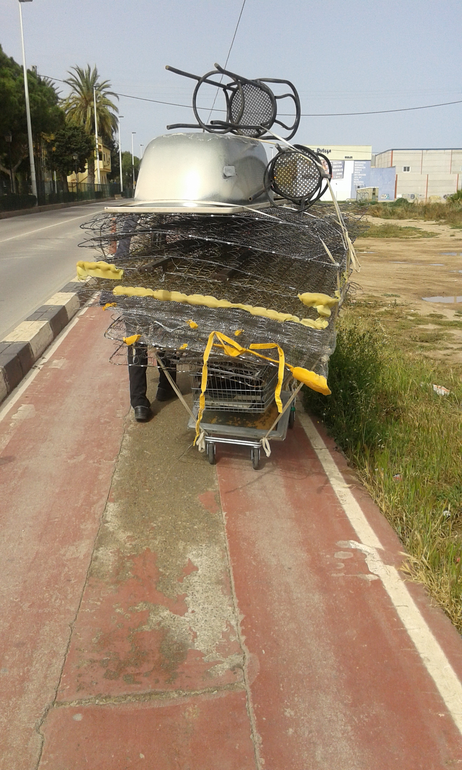 Transport de ferralla amb carret per la Via Xurra al pas per Alboraia